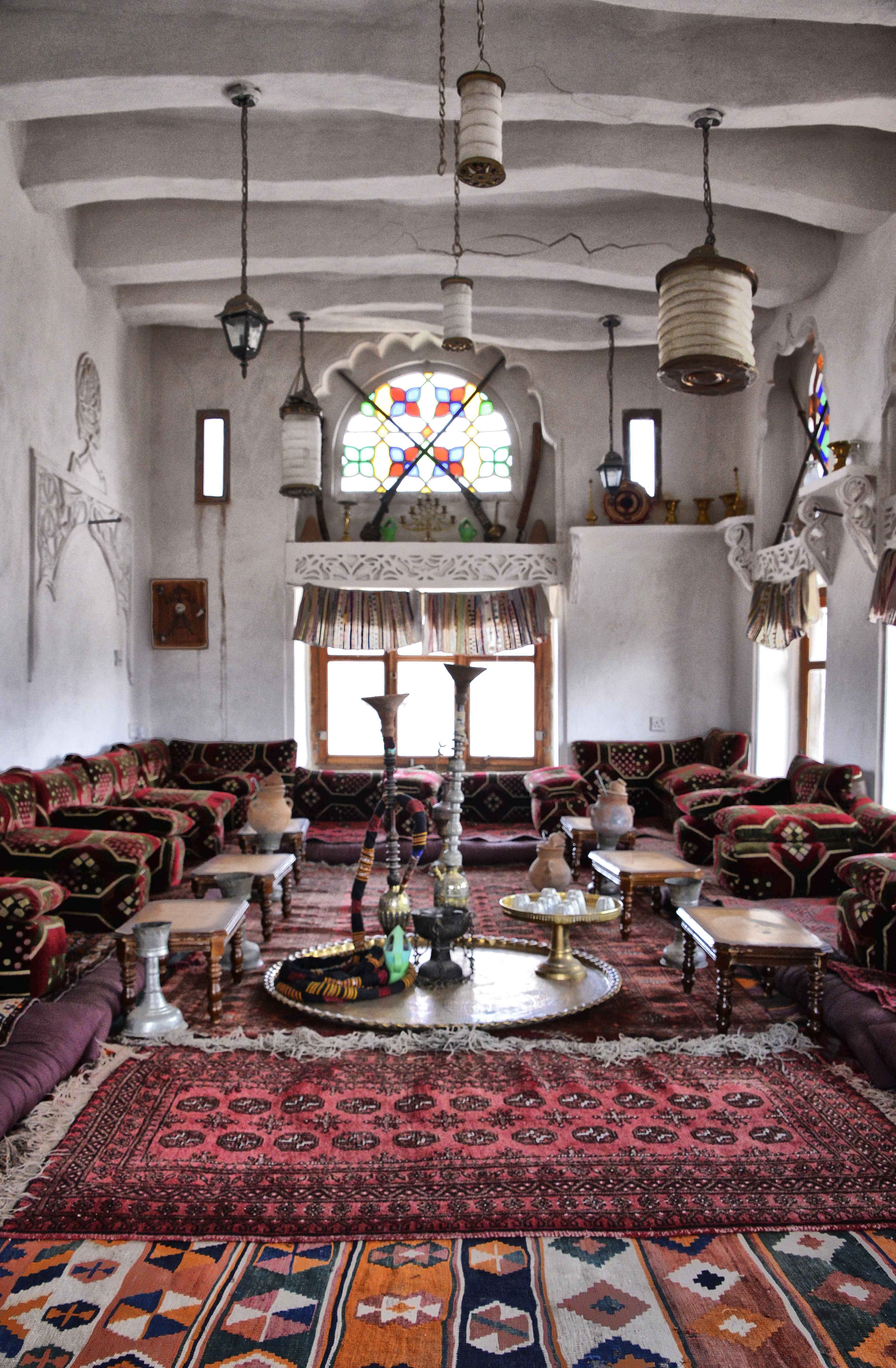 Yemen